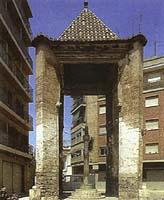 Cruz Cubierta de Mislata (Valencia, España) antes de su remodelación.